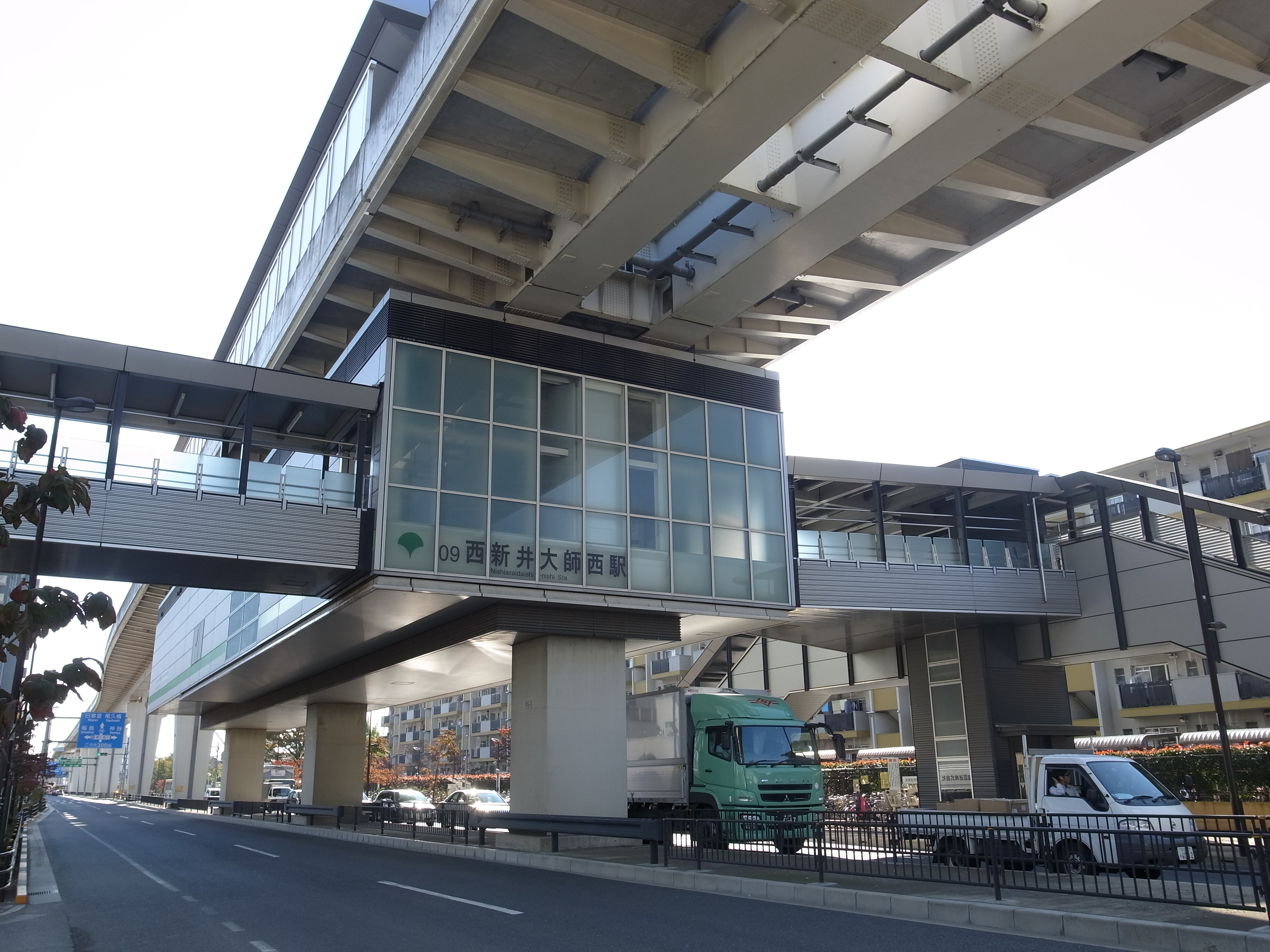 Nishiaraidaishi-nishi Station (西新井大師西駅)